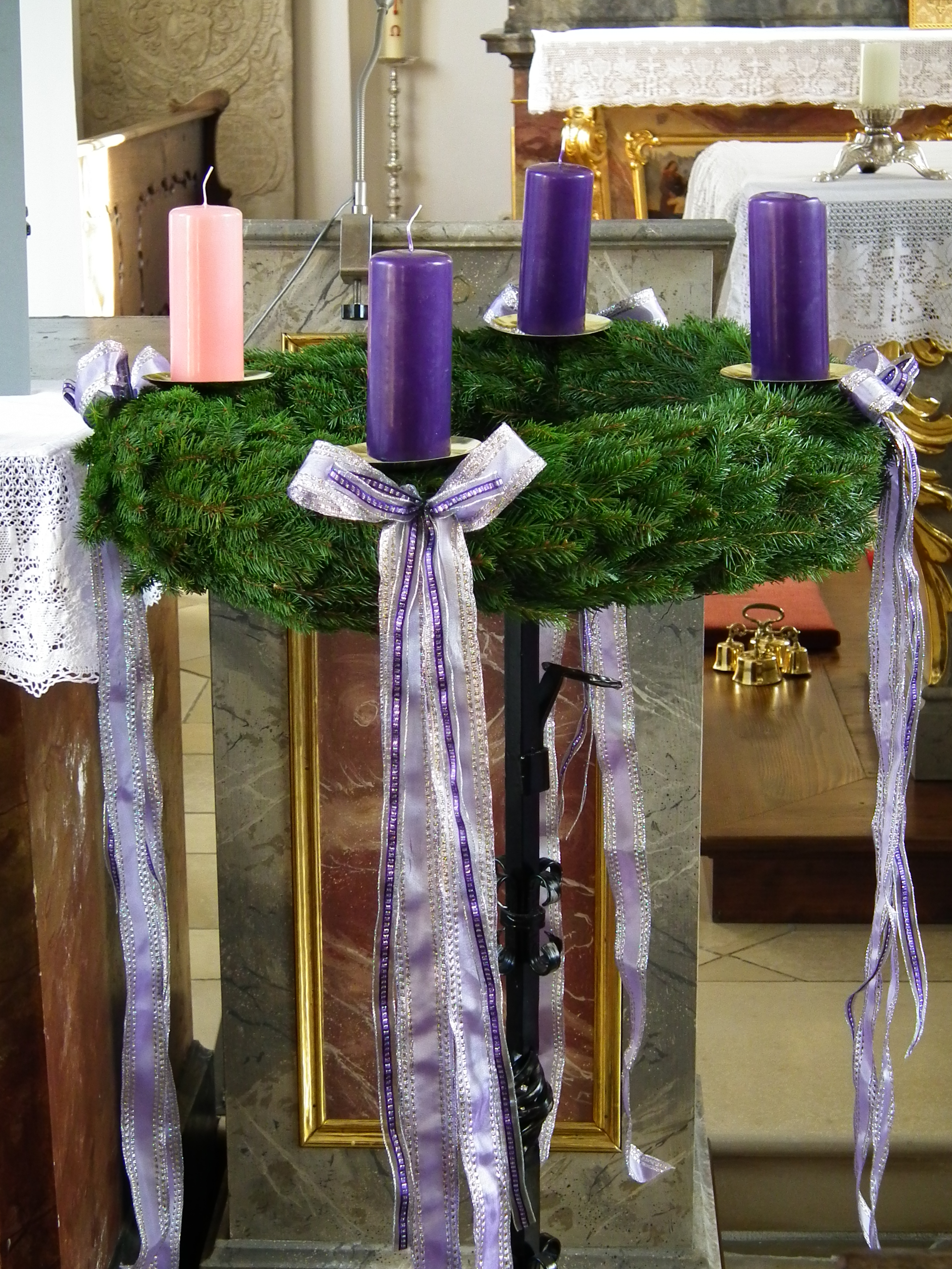 Ottinger Gotteshaus, dem Schutzheiligen St. Richard geweiht (Landkreis Donau-Ries, Bayern, Deutschland)